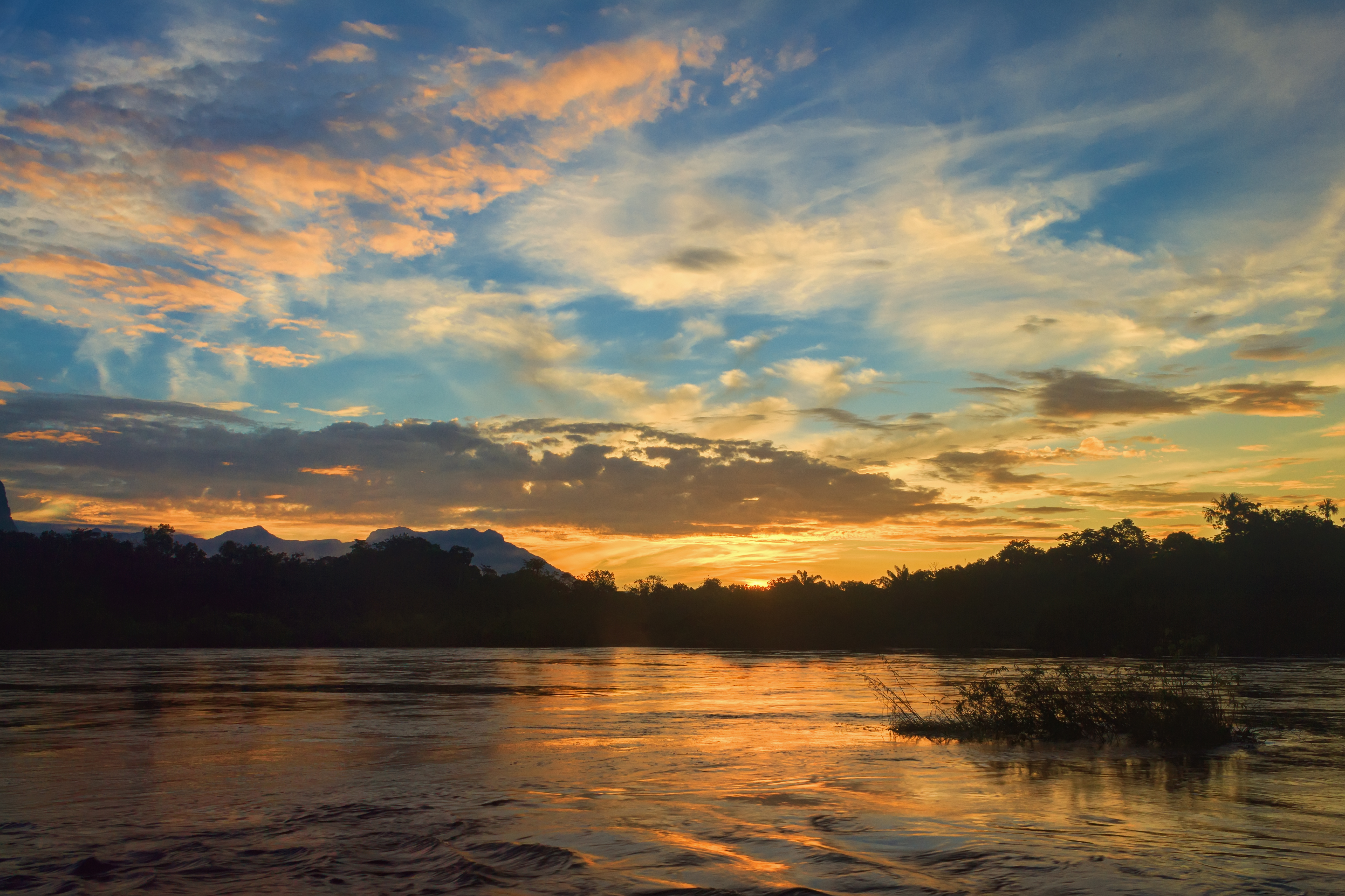 Sunrise in Ceguera.